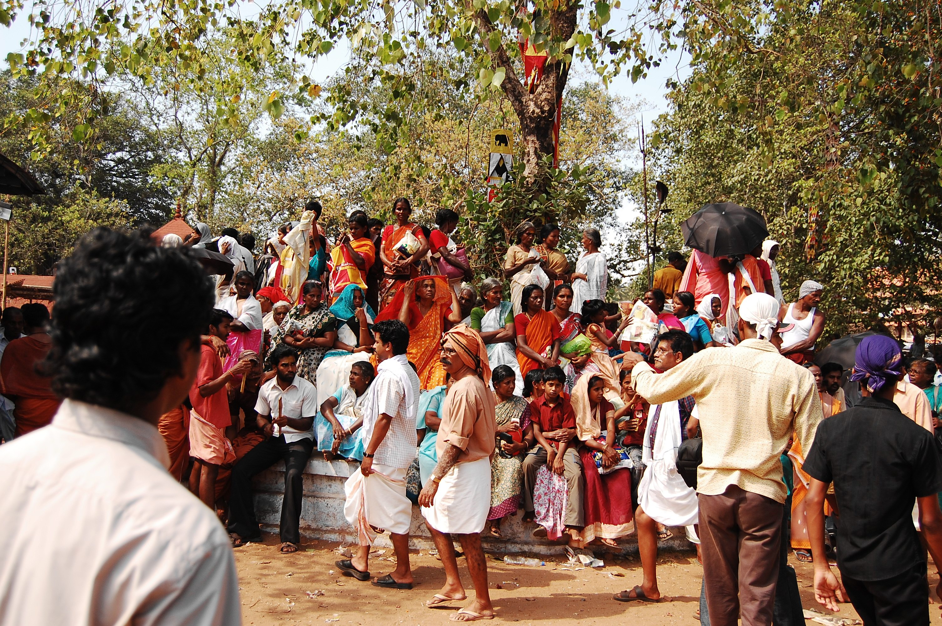 മീനഭരണി-തറക്കൂട്ടം-കൊടുങ്ങല്ലൂർ